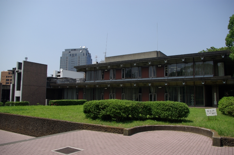 千葉県立中央図書館（設計：大高正人）